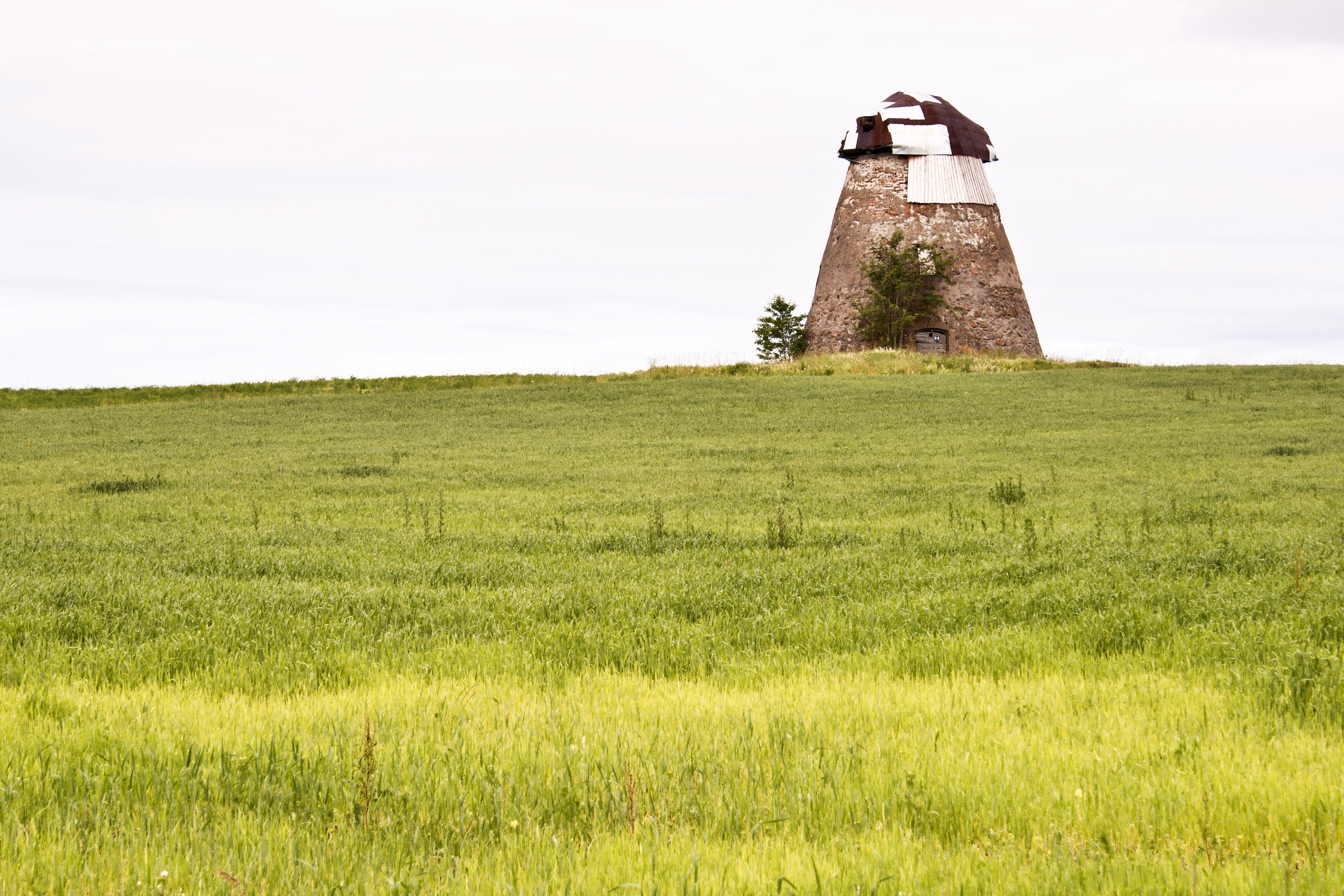 Īves vējdzirnavas